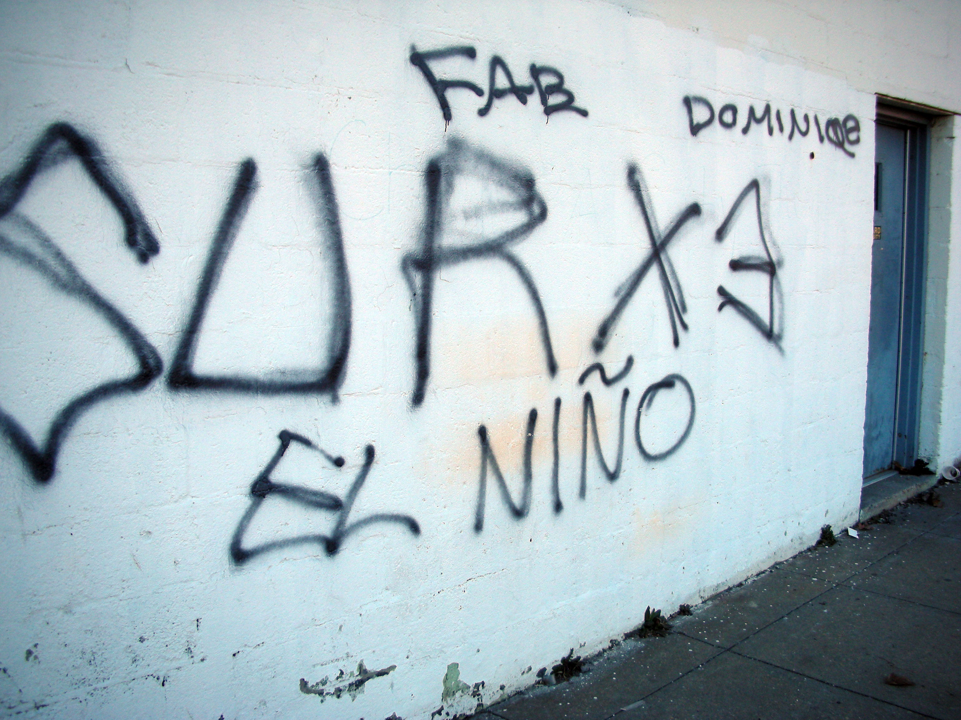 Sur X3